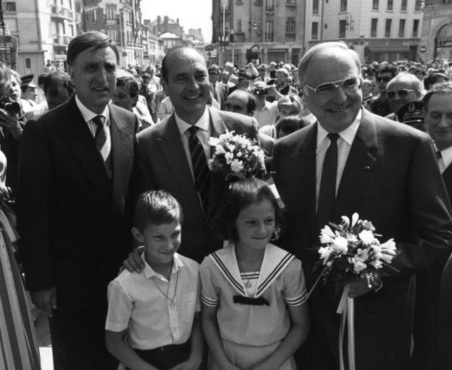 Am 5. Juli 1987 traf Bundeskanzler Dr. Helmut Kohl mit dem französischen Präsidenten Jacques Chirac in Reims zusammen, um des 25. Jahrestages der Begegnung zwischen de Gaulle und Adenauer (8.7.1962) zu gedenken, die die Versöhnung Deutschlands und Frankreichs besiegelte. In der Kathetrale von Reims nahmen die beiden Regierungschefs an einem Hochamt mit Erzbischof Ménager teil. Nach einem Empfang im Rathaus flogen Bundeskanzler Kohl und Ministerpräsident Chirac nach Colombey-les-deux-églises, wo sie das Grab General de Gaulles und seine frühere Residenz "La Boisserie" besichtigten.